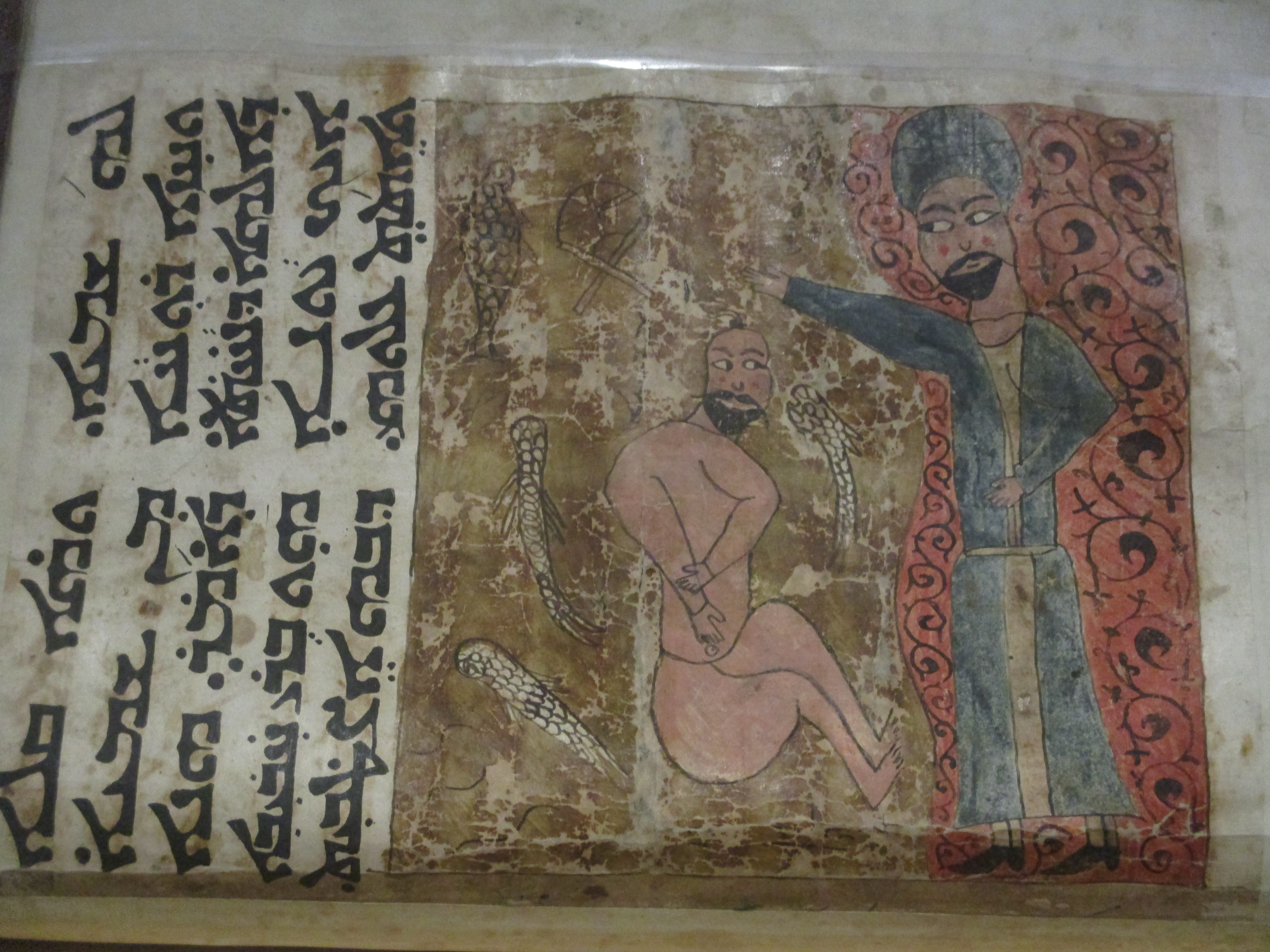 Évangile en syriaque. Enluminure représentant le Baptême du Christ. Saint Jean-Baptiste est vêtu de bleu, couleur des dhimmis à l'époque en Syrie. Présenté à l'exposition "Les Chrétiens d'Orient, deux mille ans d'histoire" à l'institut du monde arabe de Paris (septembre 2017-janvier 2018).